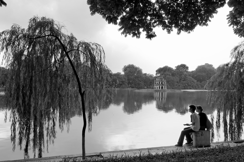 Hoan Kiem lake, Hanoi, Vietnam